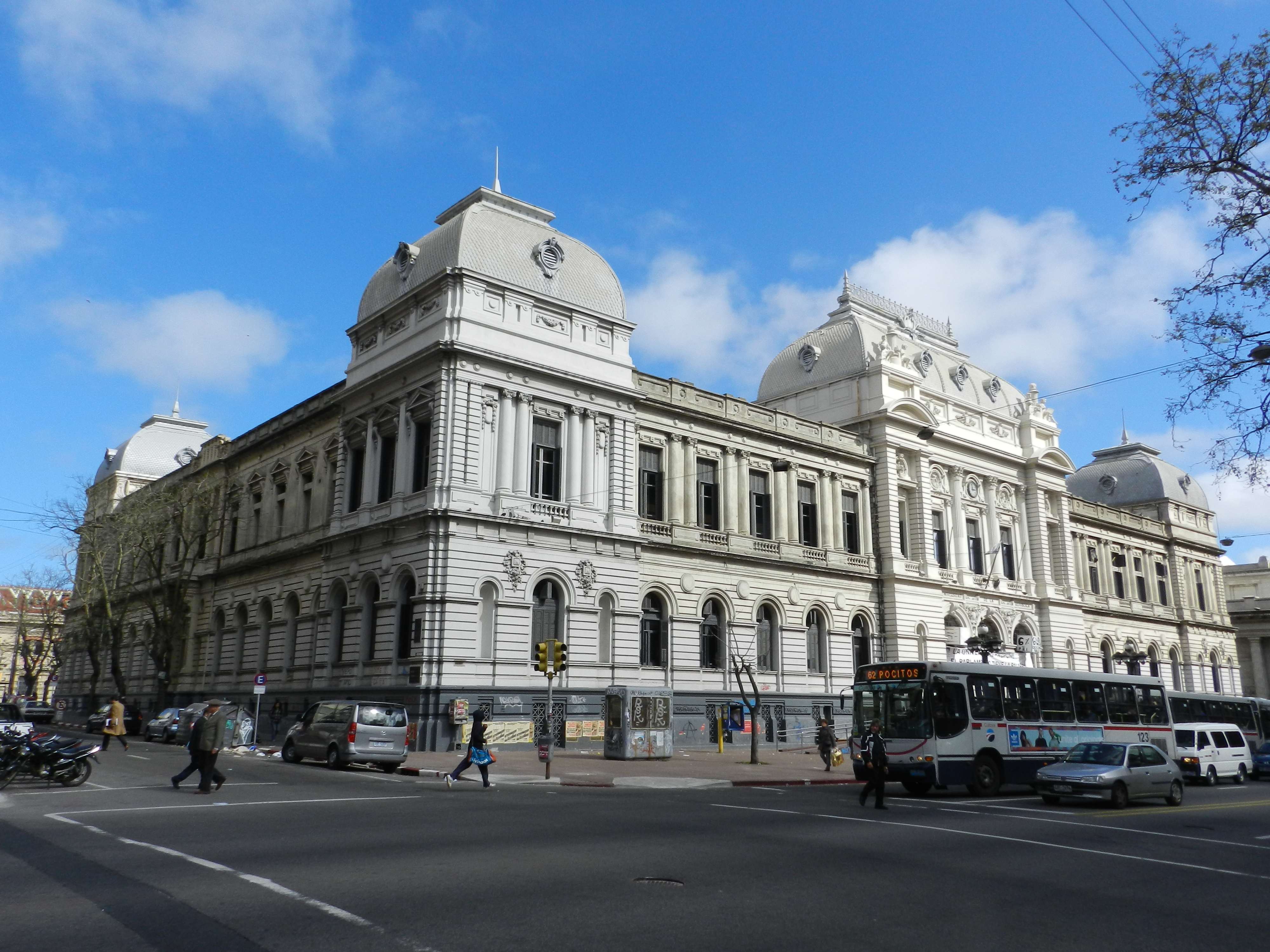 Universidad de la República. Ubicada en el departamento de Montevideo